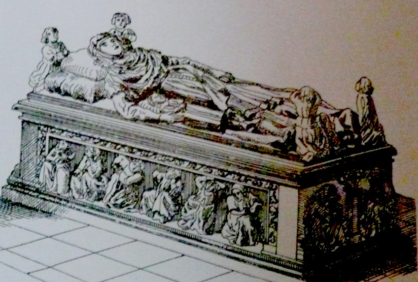 Porphyrgrabmal der Herzogin Blanche